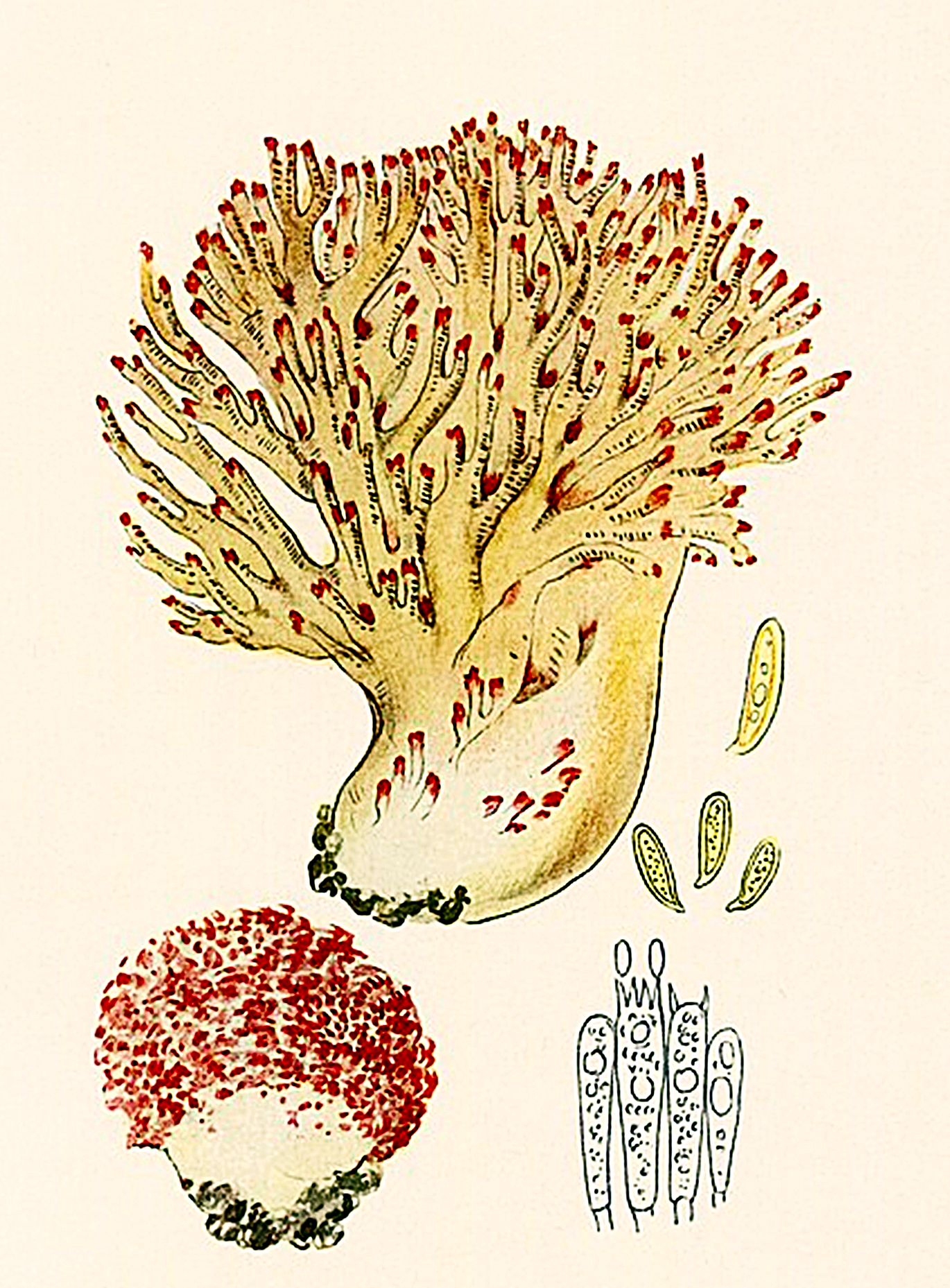 Giacomo Bresadola - Clavaria botrytes Pers., heute Ramaria botrytis (Pers.) Ricken (1918)